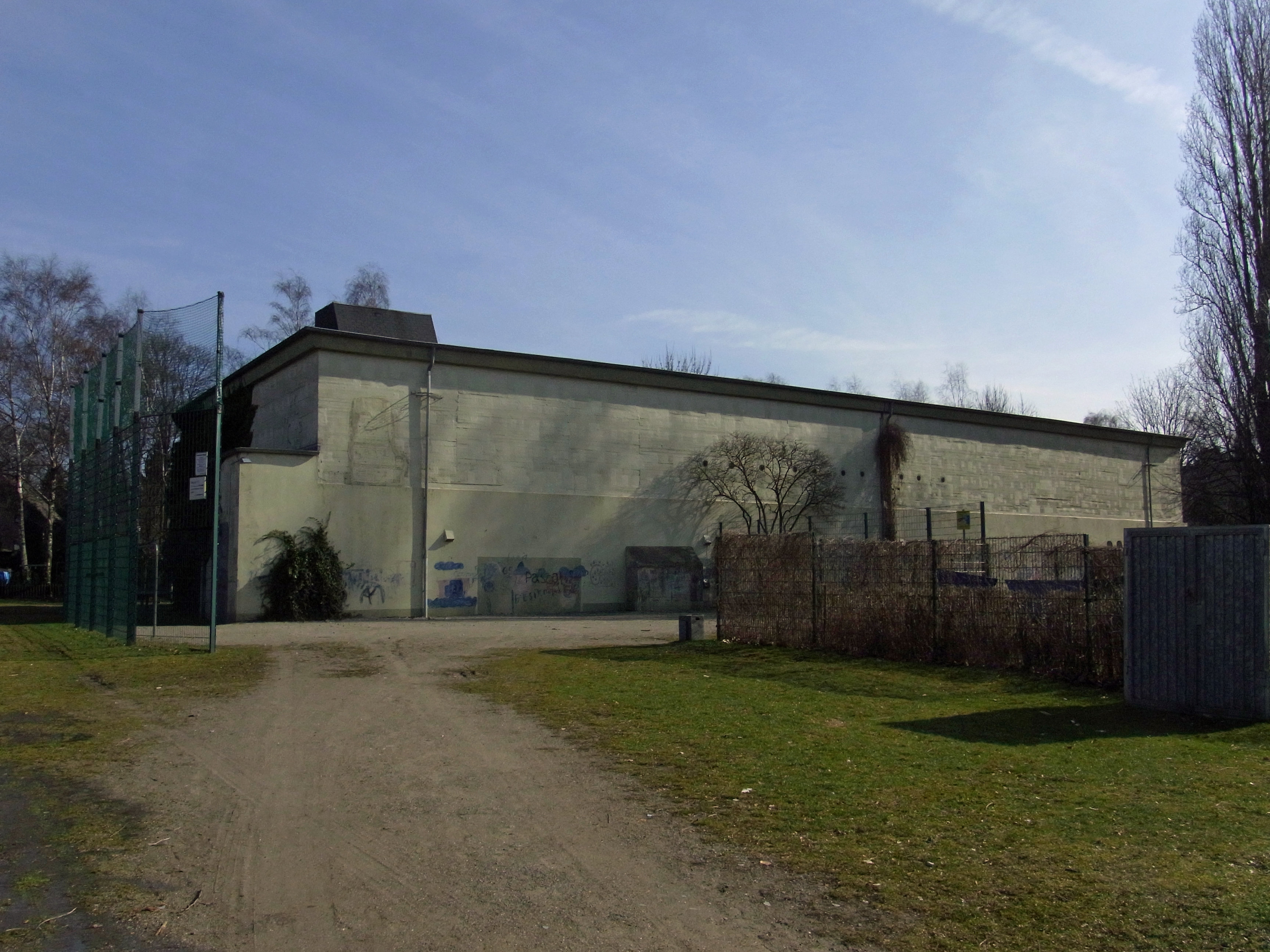 Siedlung Eisenheim